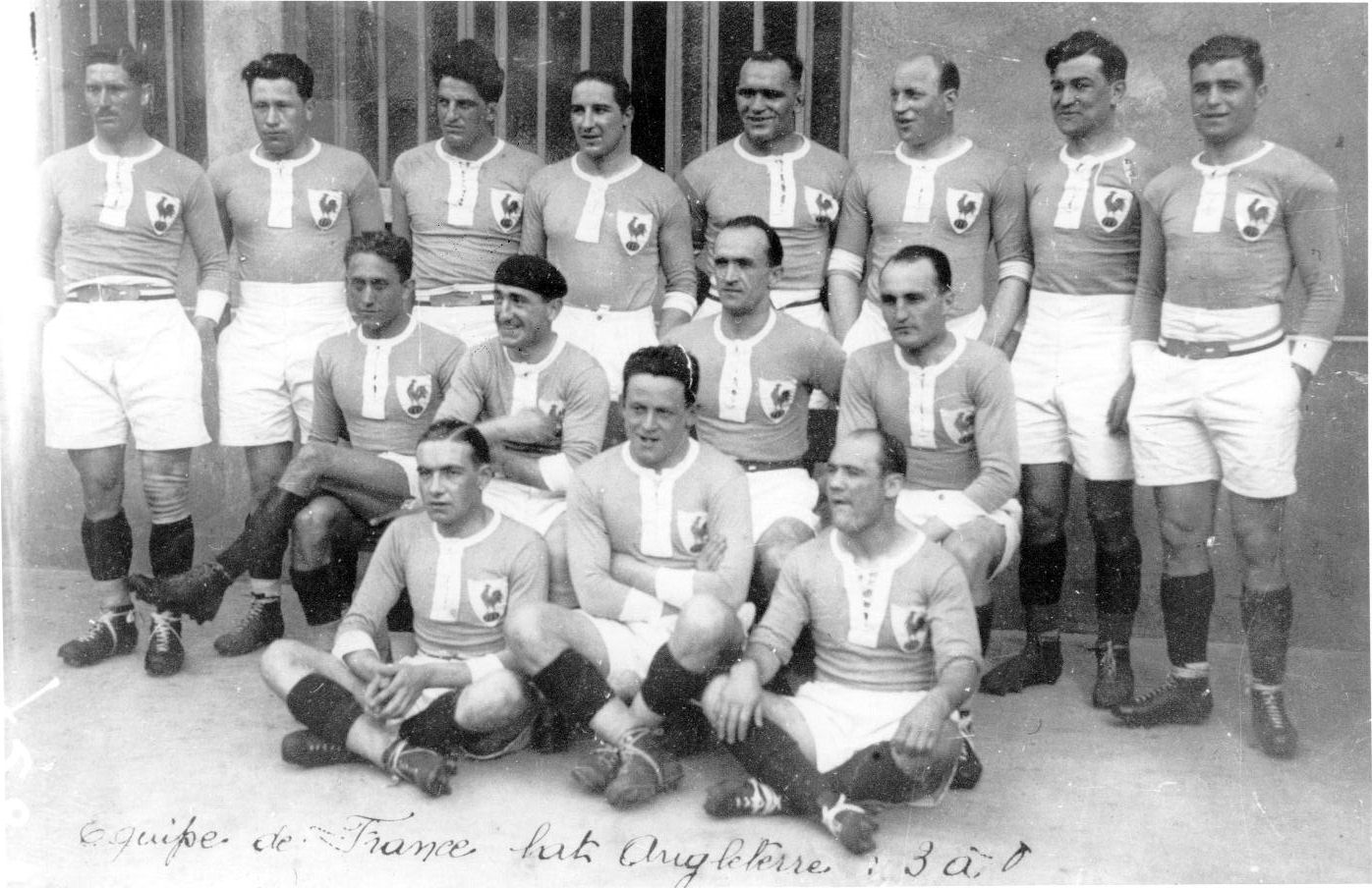 Clément en bas à droite de cette photo. 1927, première victoire Française contre les Anglais.